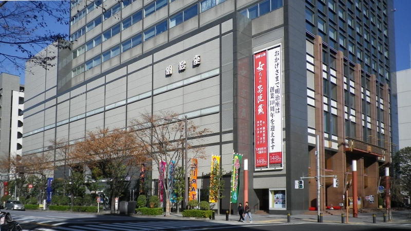 明治座